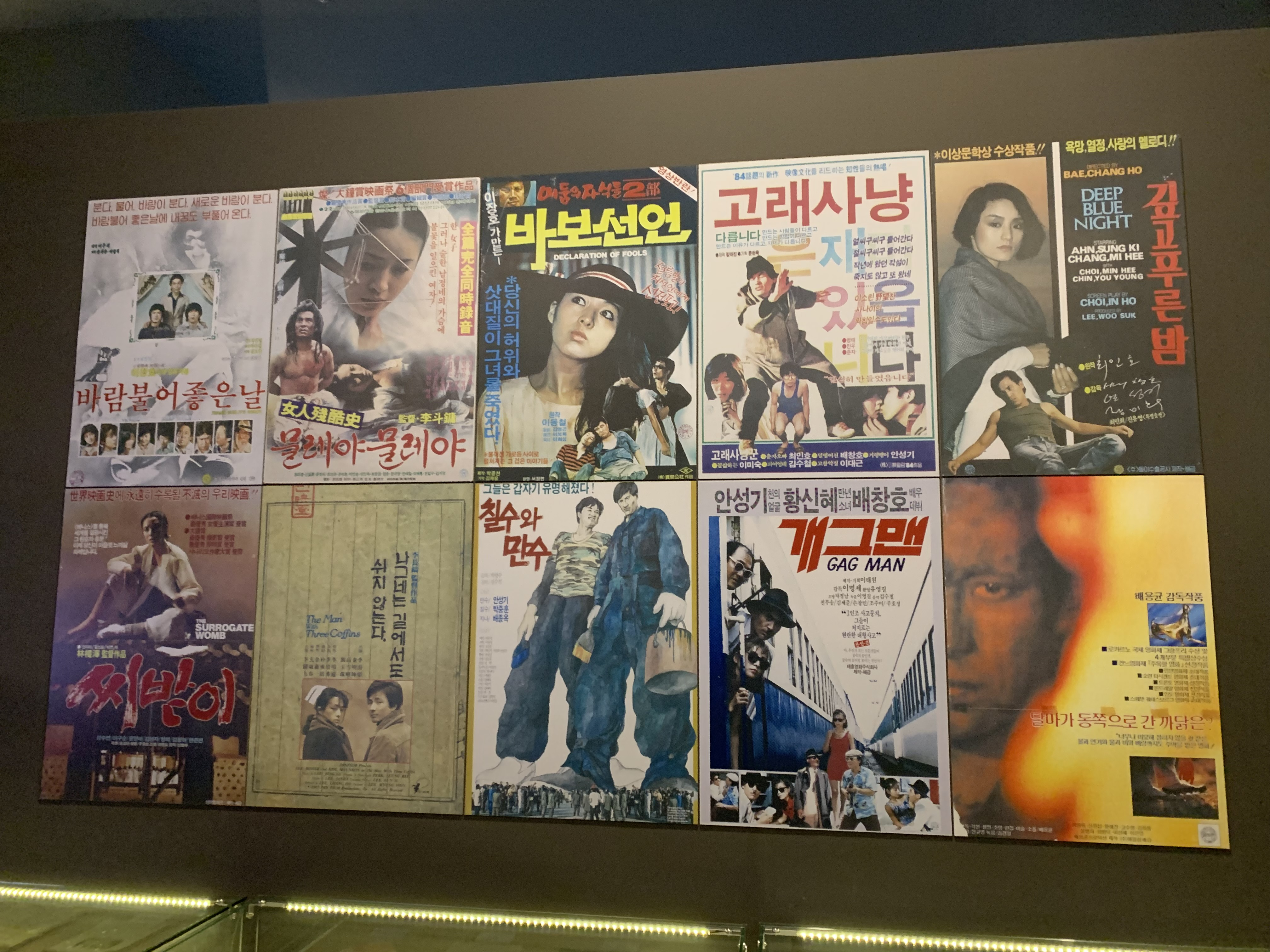 영상자료원 영화박물관에 전시된 영화 포스터